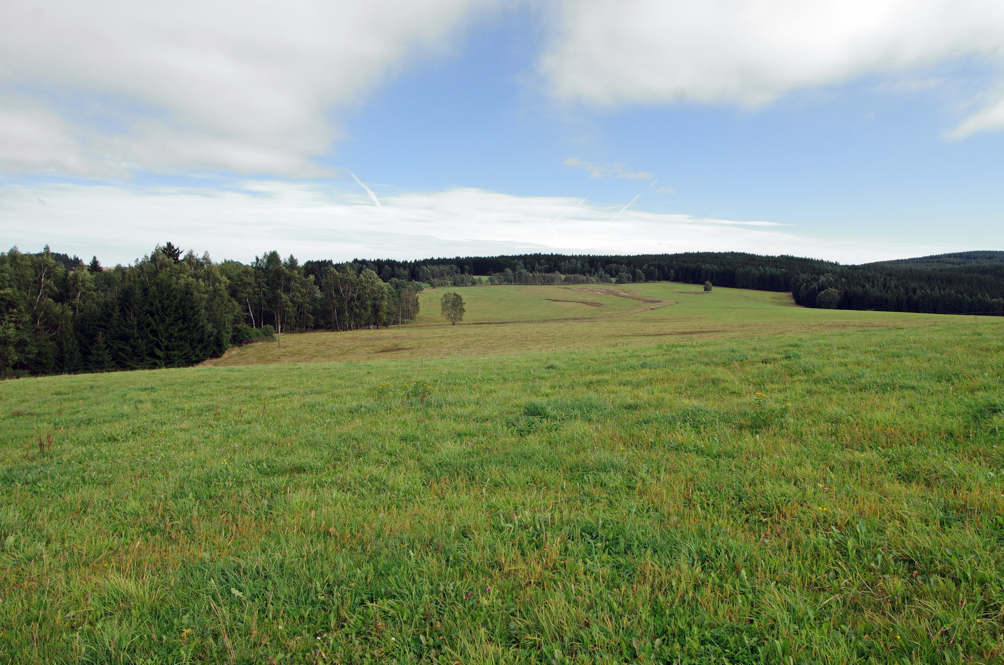 zaniklá obec Smrkovec, pohled na místo zaniklé obce ze svahu vrchu Kozák, Slavkovský les, okres Sokolov